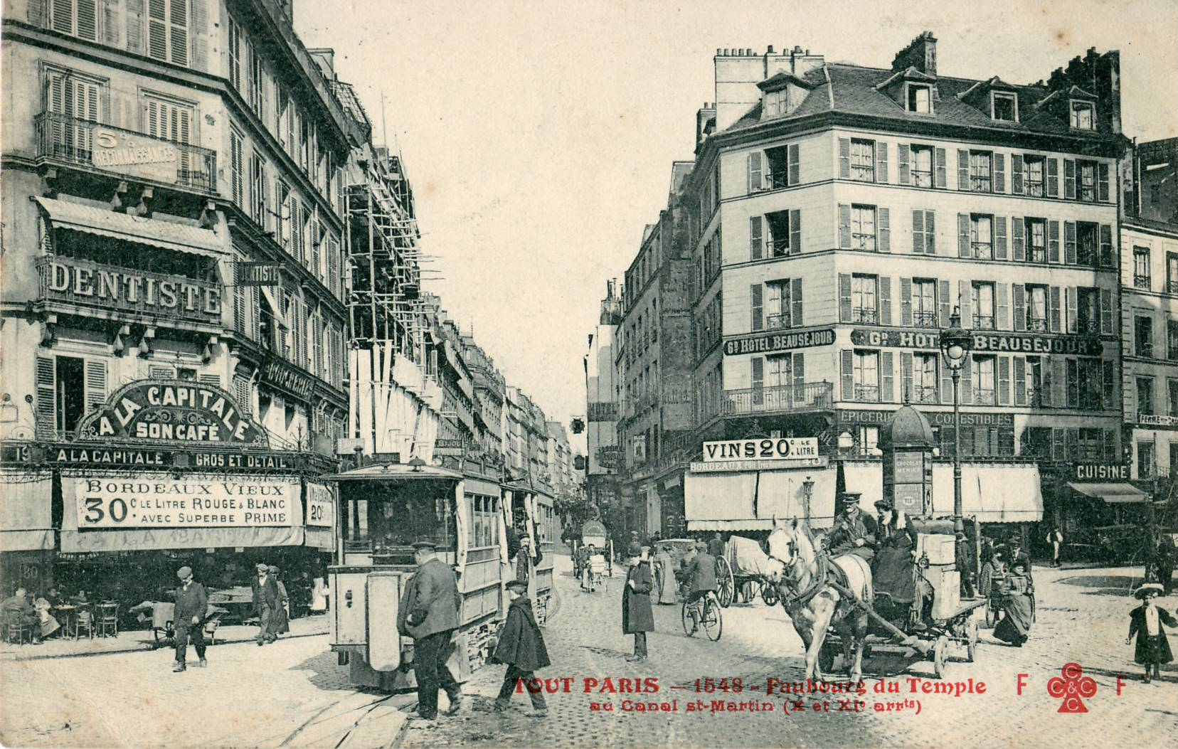 Carte postale ancienne éditée par FF - CCCC Collection "Tout Paris" N° 1548Faubourg du temple au Canal Saint-MartinVue en gros plan de deux voitures du Tramway funiculaire de Belleville